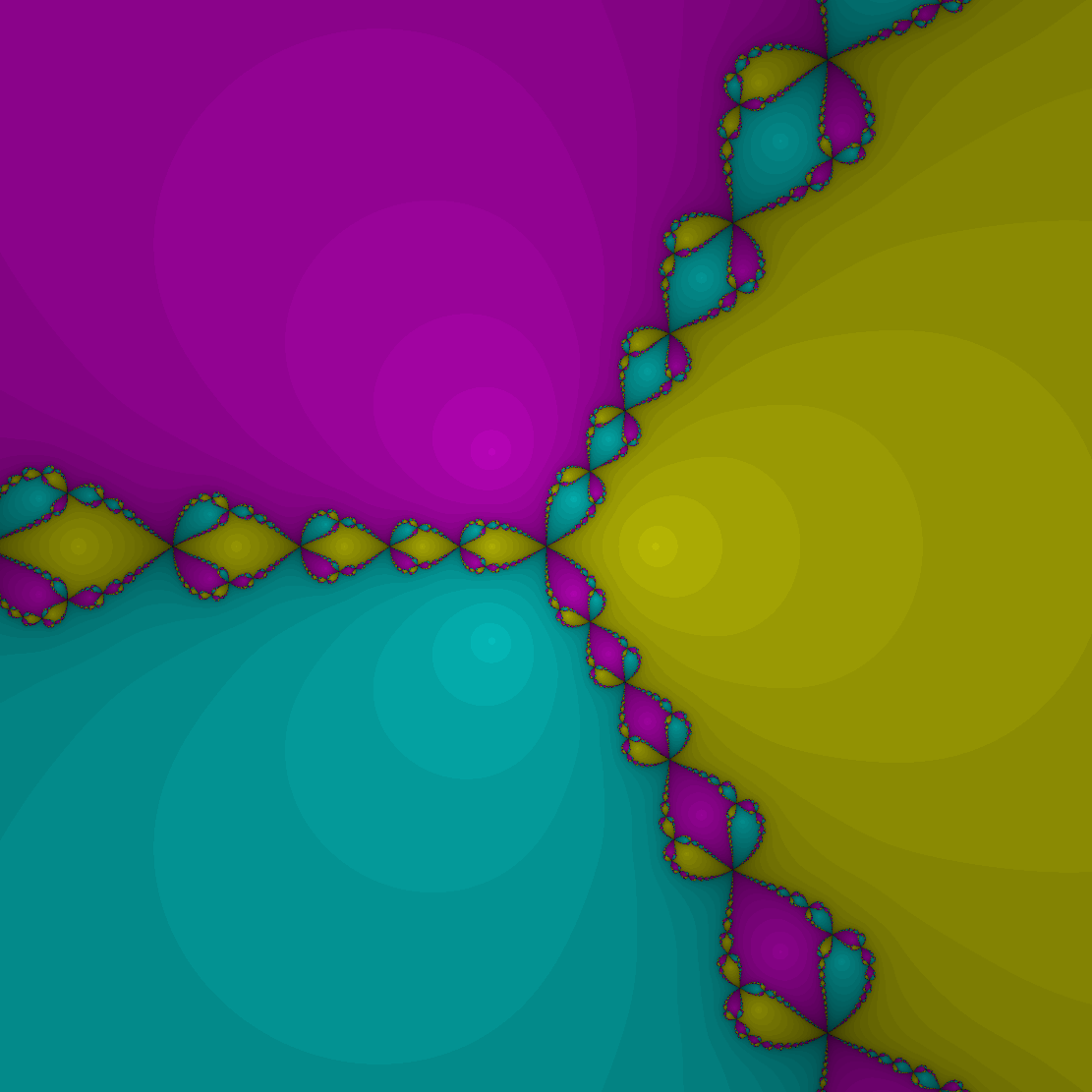 Newton-Fraktal der 3. Einheitswurzeln bzw. des Kreisteilungspolynoms vom Grad 3